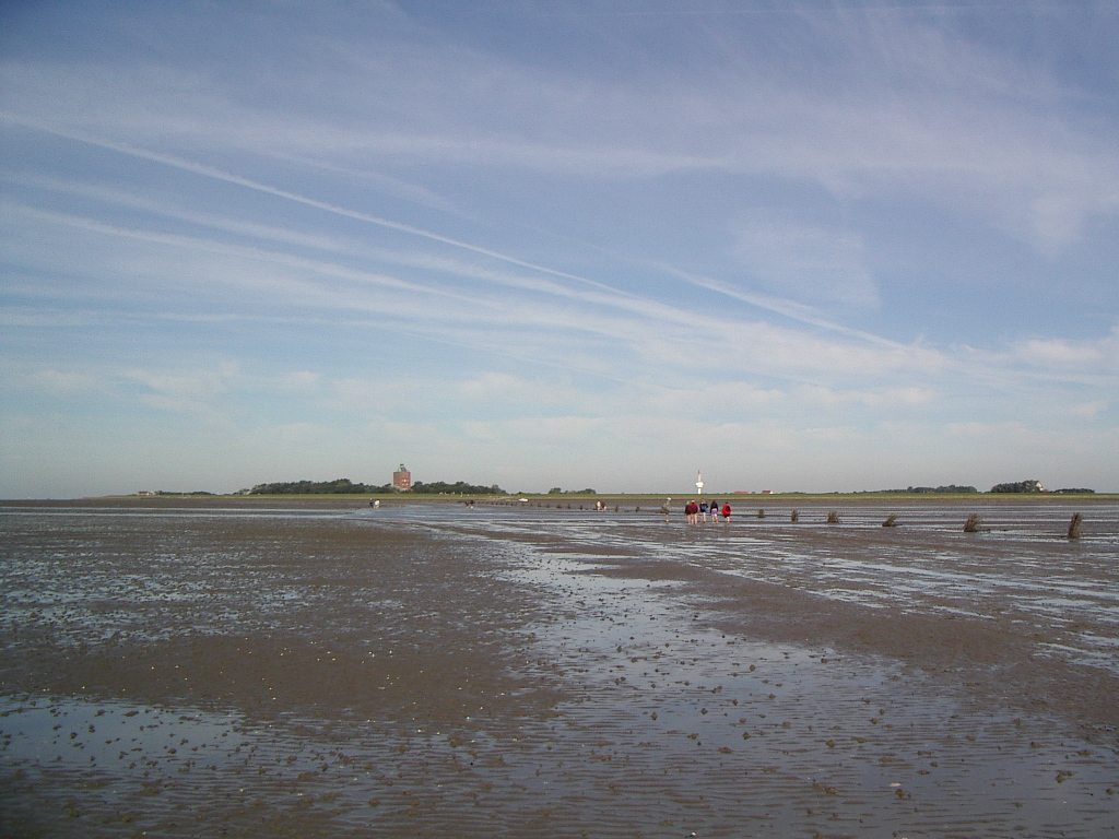 Beschreibung: Watt bei Cuxhaven, mit Blick auf die Insel Neuwerk